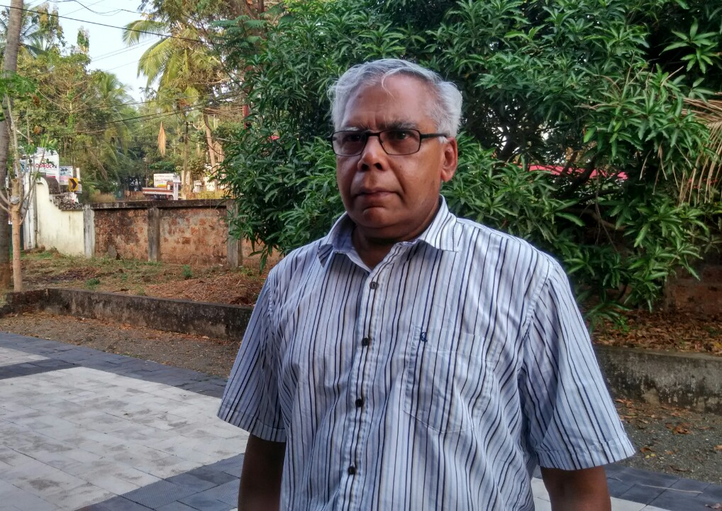 Brazil scientist